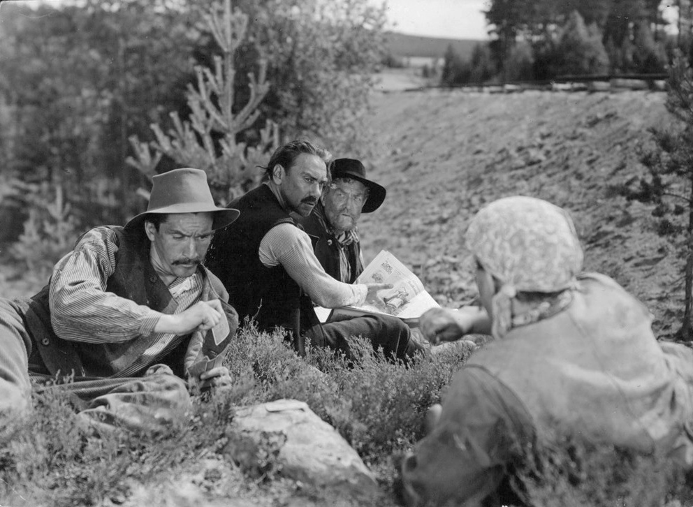 Film "Rallare". Filmjournalen nr 40/49.